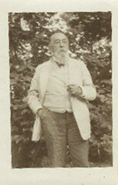 Foto von Prof. Dr. Julius Schreiber aus Königsberg. Das Foto ist in 1930 in Neuhäuser (Ost Preusen) gemacht worden.